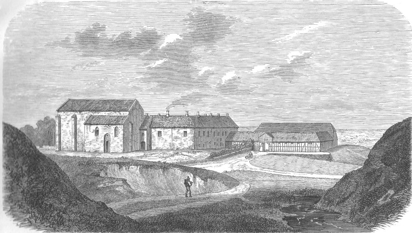 Hovedgaarden Børglumkloster i Vendsyssel var oprindelig en Kongsgaard, der allerede nævnes paa Knud den Helliges Tid. I det følgende Aarh. blev Gaarden skænket til Præmonstratenserordenen, som c. 1130 opførte den Bygning, der for alt væsentligt staar der endnu. Efter Reformationen var Klosteret kgl. Lehn, indtil Christian IV 1623 henlagde det til det nyoprettede ridderlige Akademi i Sorø Efter dettes Nedlæggelse blev Gaarden 1669 privat Ejendom. Blandt dens Ejere kan nævnes Laurits de Thurah, Christiansborgs og Hirschholms Bygmester, der ejede Gaarden 1750-57 Tilhører nu Familien Rottbøll.